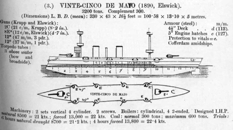 Crucero acorazado ARA 25 de Mayo